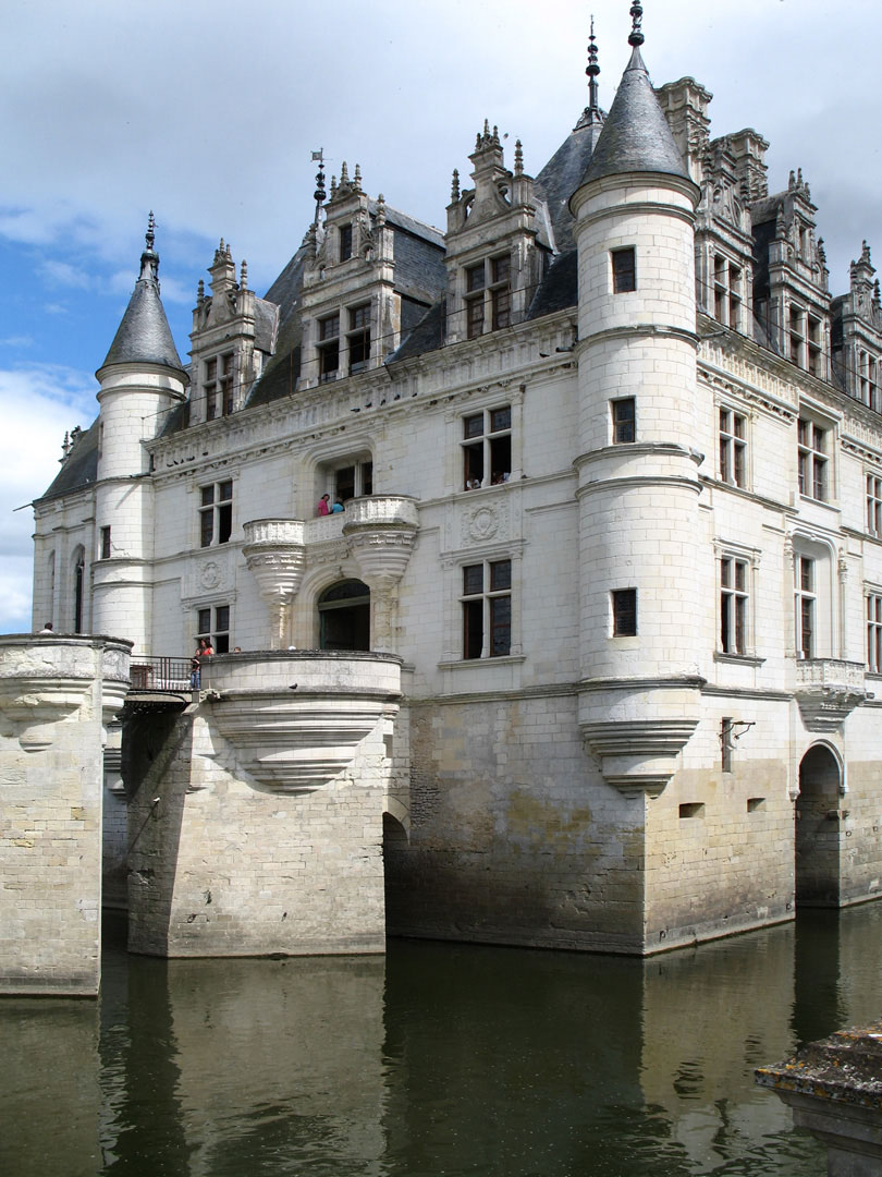 Château de Chenonceau, France